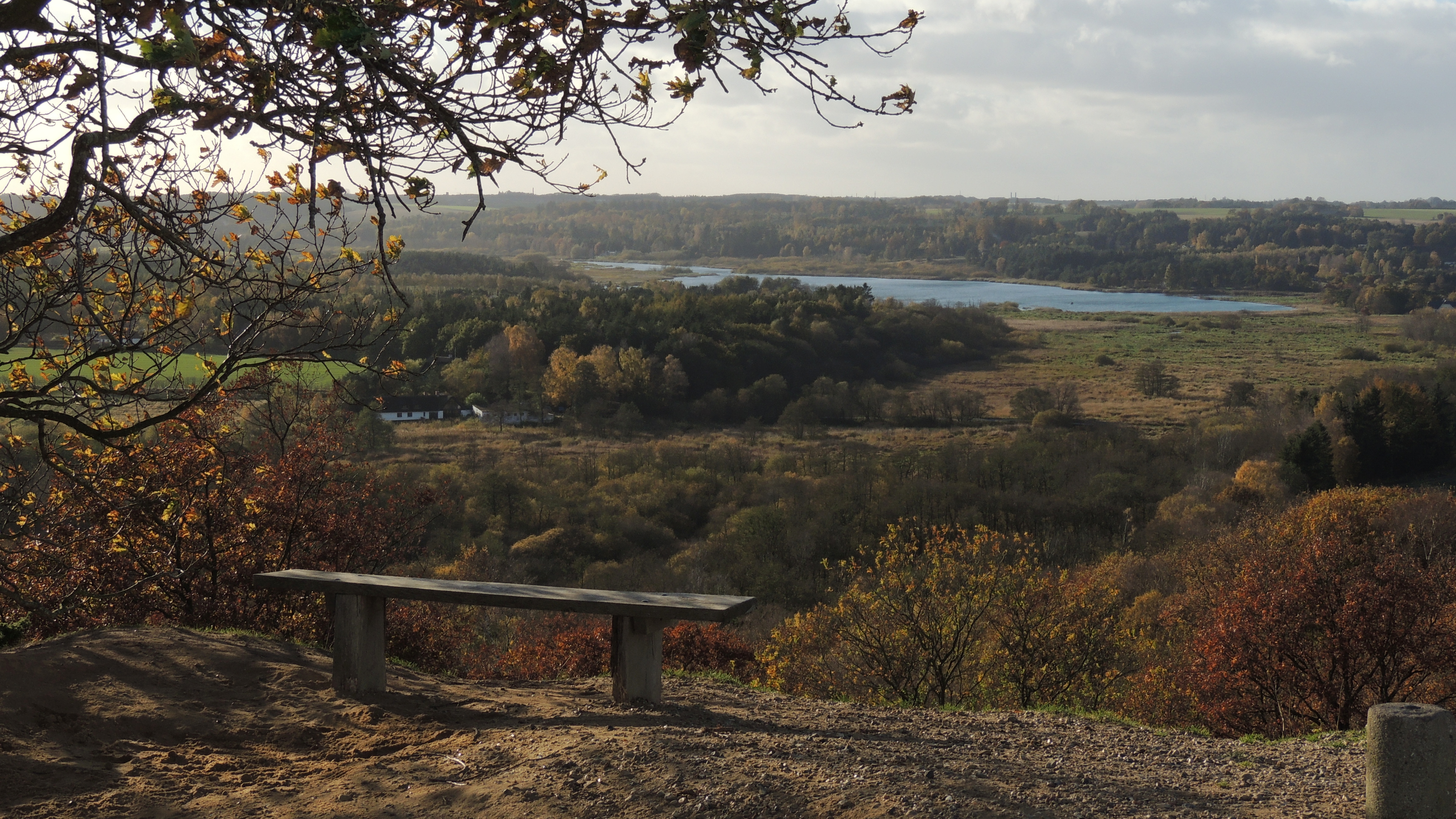 Udsigt fra Troldhøj mod Sminge sø